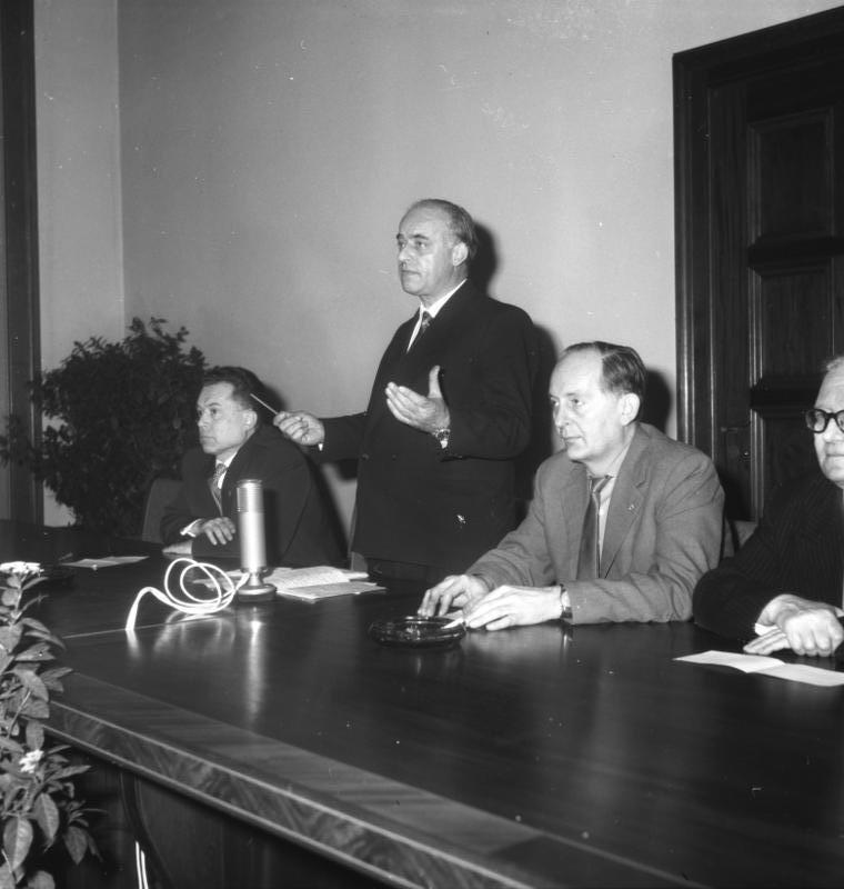 Zentralbild/Ger 15.1.1959 Studentenkongreß faßt wichtigen Beschluß über Regierungsverhandlungen DDR-Westdeutschland Verhandlungen zwischen den Regierungen der Bundesrepublik und der DDR über einen Friedensvertrag mit Deutschland eine Konföderation der beiden deutschen Staaten fordert der Studentenkongress gegen Atomrüstung in Westberlin am 4.1.1959 in einer Schlusserklärung. Der überragend wichtige Beschluss wurde mit grosser Mehrheit gefasst, nachdem dramatische, wütende Verstösse von Vertretern Willy Brandts und dem Berliner SPD-Landesvorstand gescheitert waren. Dem Beschluss kommt weit über den akademischen Rahmen höchste Wichtigkeit für ganz Deutschland zu. UBz.: In einer Versammlung in der Berliner Humboldt-Universität über den Studentenkongress v.l.n.r.: Staatssekretär Wilhelm Girnus; Prof. Dr. Hartke, Rektor der Berliner Humboldt-Universität; Atomphysiker Prof. Dr. Havemann.